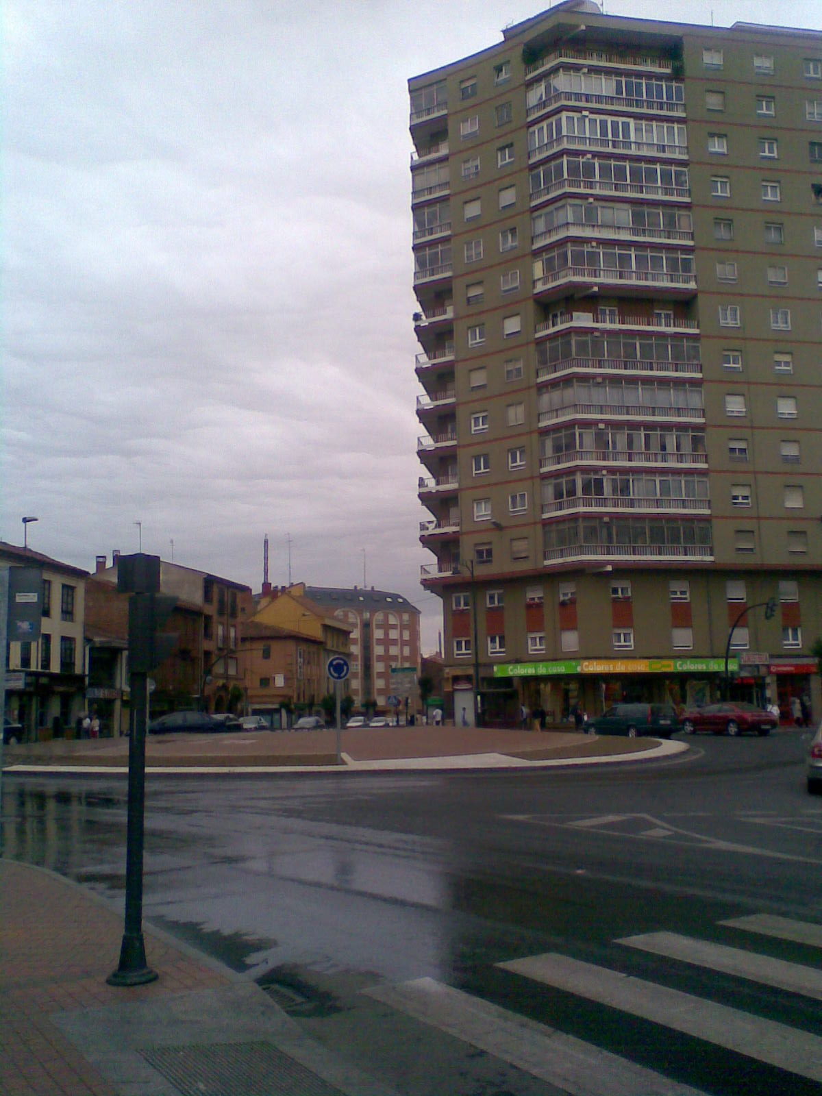 Glorieta de El Crucero y la Torre de Quevedo. El barrio de El Crucero es uno de los barrios obreros de la capital leonesa.